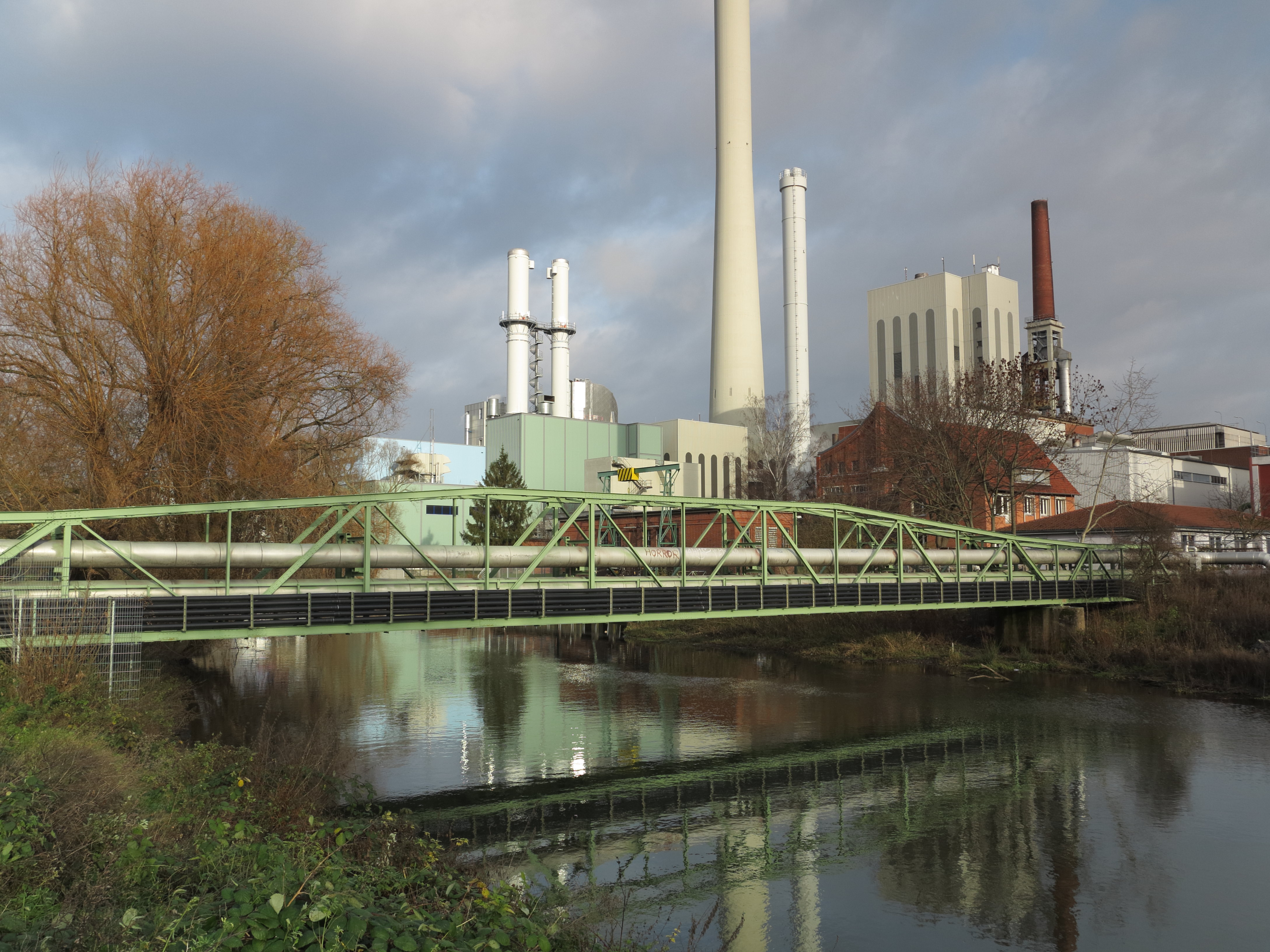 Braunschweig: die Rohrbrücke, die in Höhe Heizkraftwerk Mitte Fernwärmeleitungen über die Oker führt.